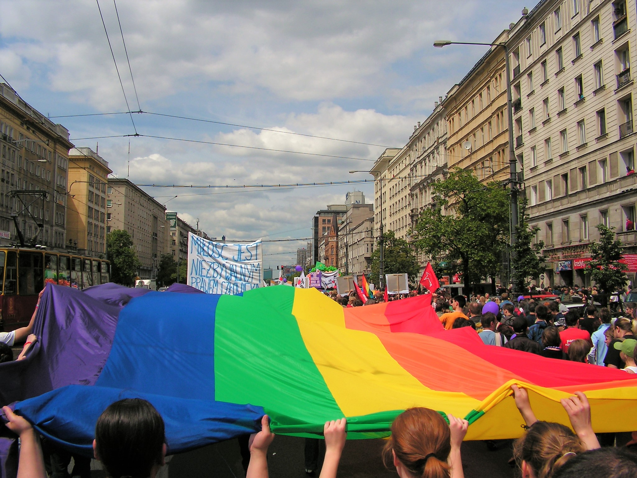 Parada Rownosci 2006, ul. Marszalkowska